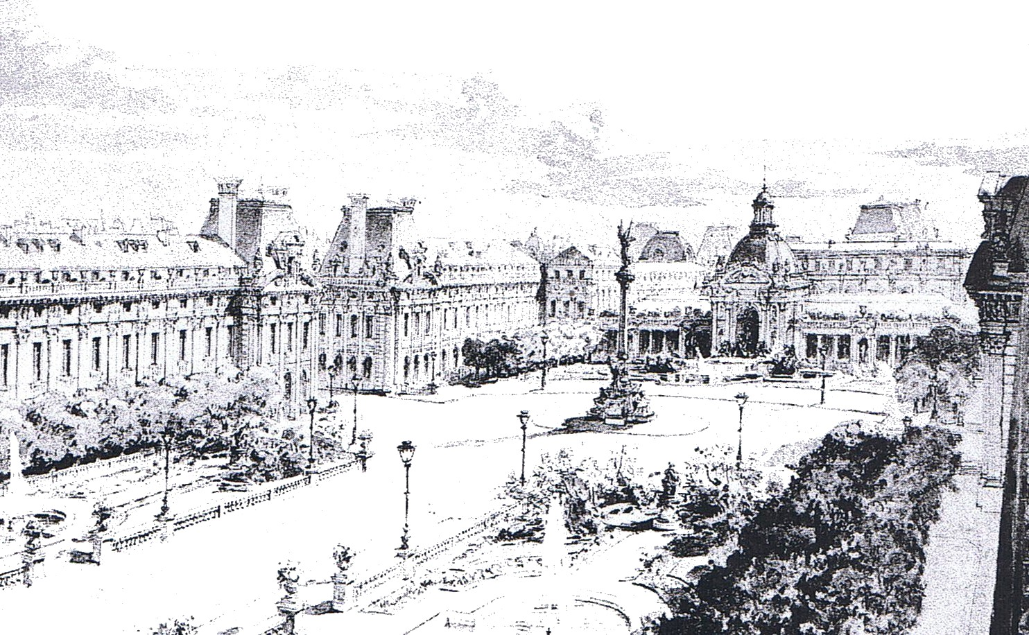 Projet de transformation du Palais-Royal.